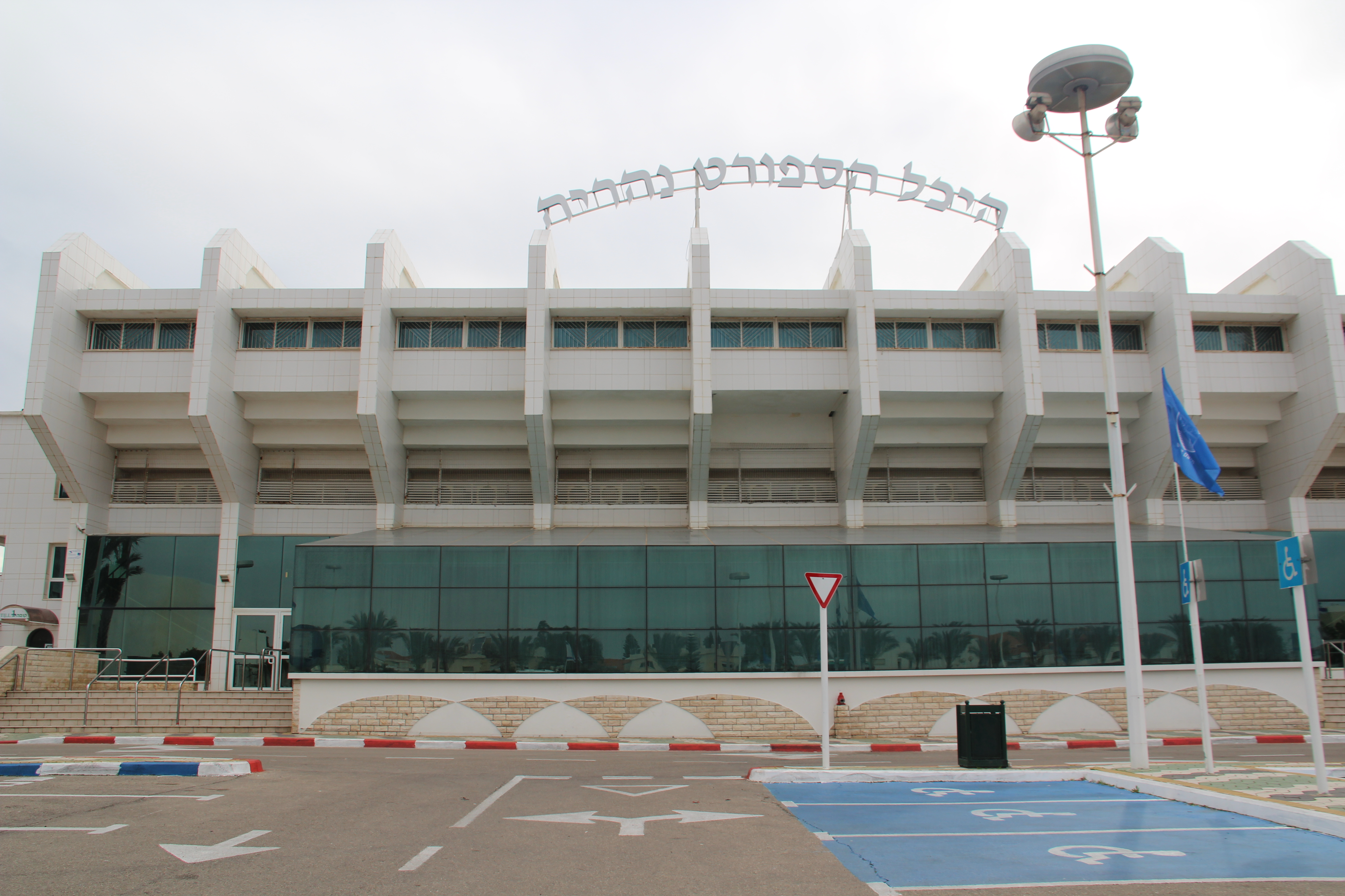 אולם ספורט עין שרה נהריה